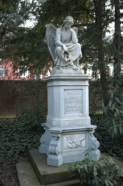 Frankfurter Hauptfriedhof - Gewann C 123, Grabstätte des Malers Franz Xaver Winterhalter